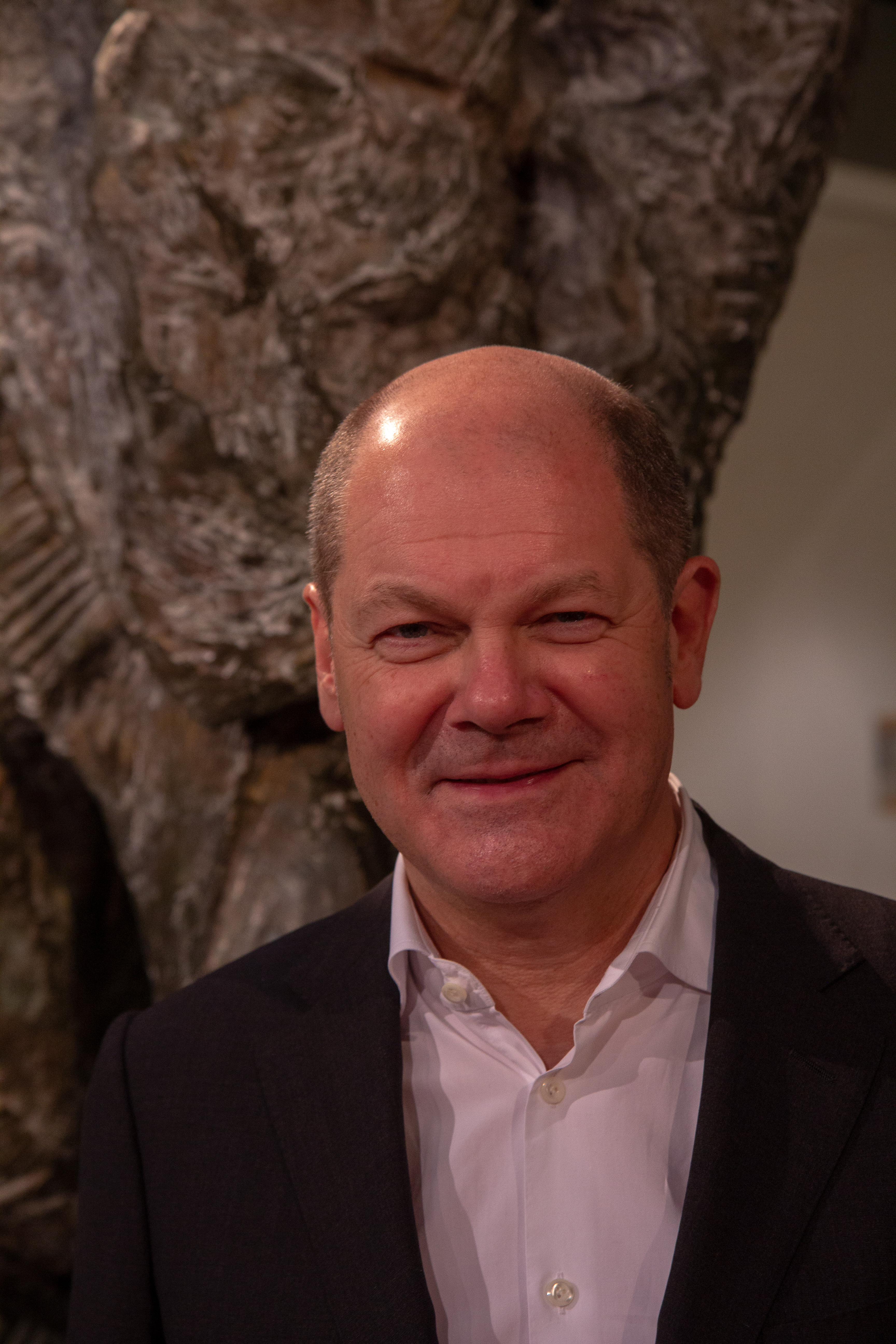 Olaf Scholz auf der Europadelegiertenkonferenz der SPD am 9. Dezember 2018 in Berlin, Willy-Brandt-Haus